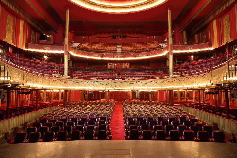 La salle de spectacle des Folies Bergère